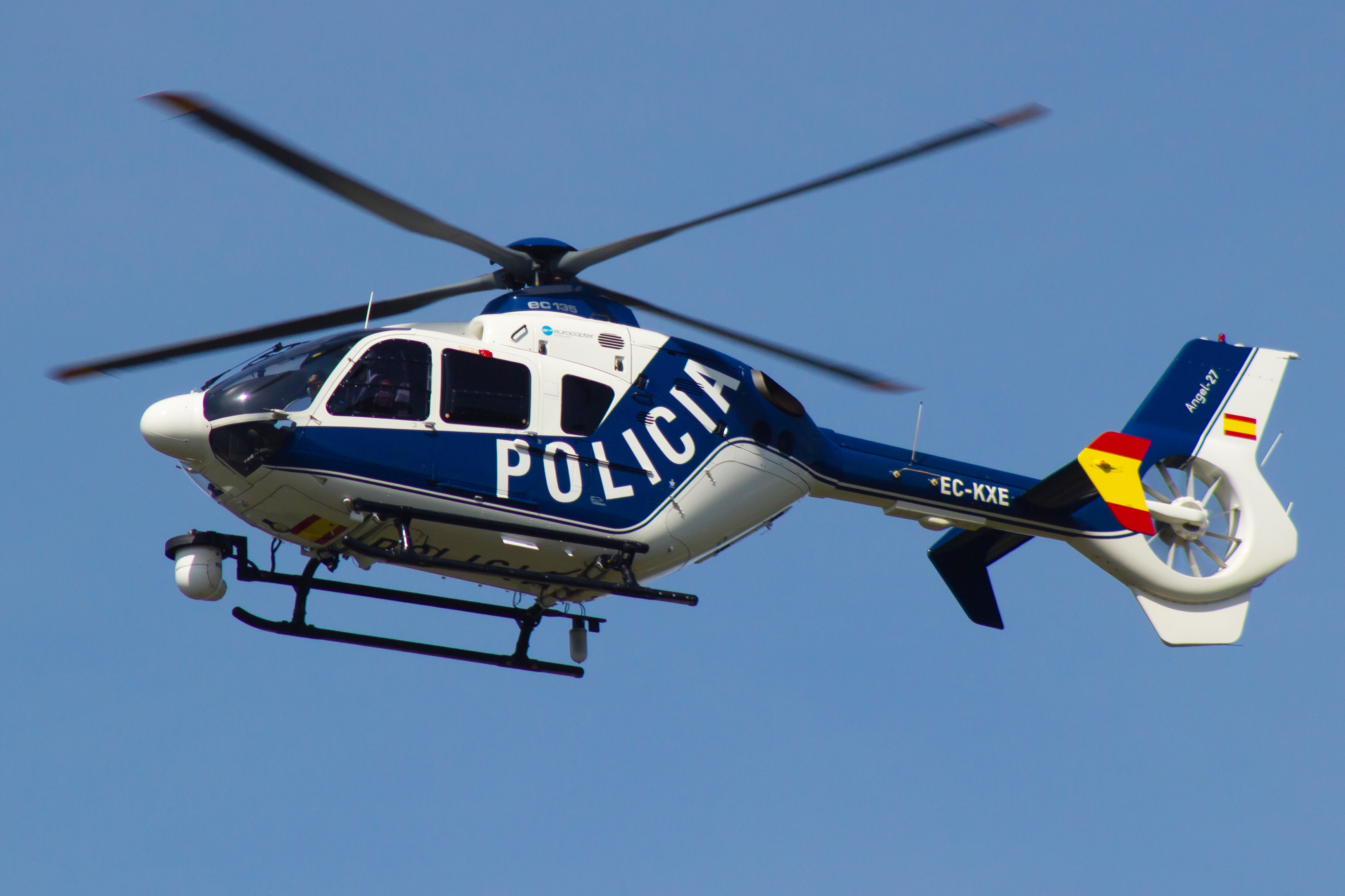 Eurocopter EC 135-P2+ da Policía no aeroporto de Santiago de Compostela.